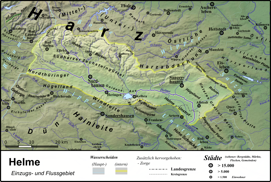 Einzugs- und Flussgebietskarte des Unstrut-Nebenflusses Helme; hervorgehoben ist auch die Zorge als hydrologischer Haupt-Quelllauf.